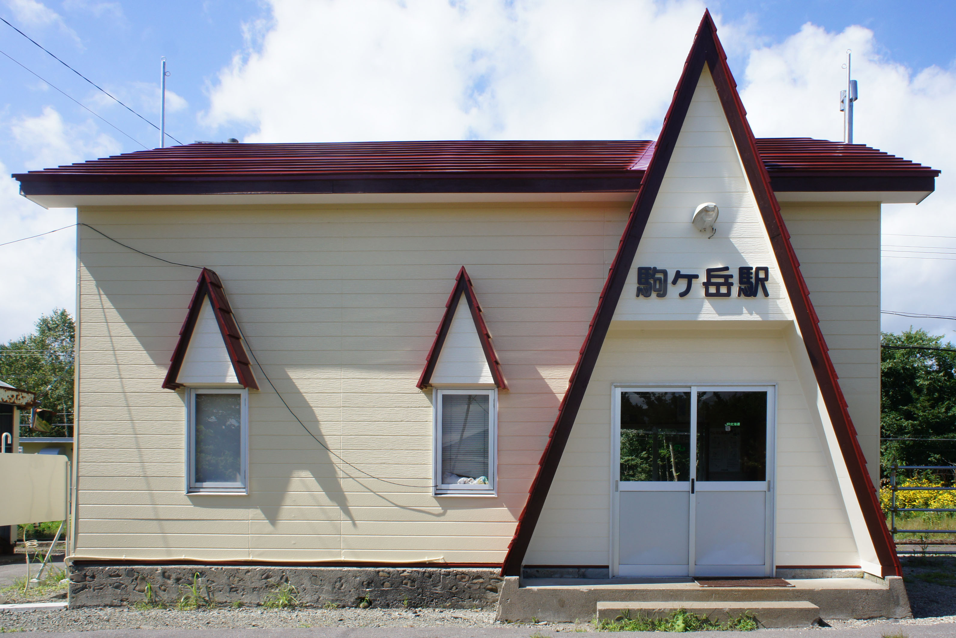 JR函館本線・駒ヶ岳駅の駅舎 Sony NEX-3